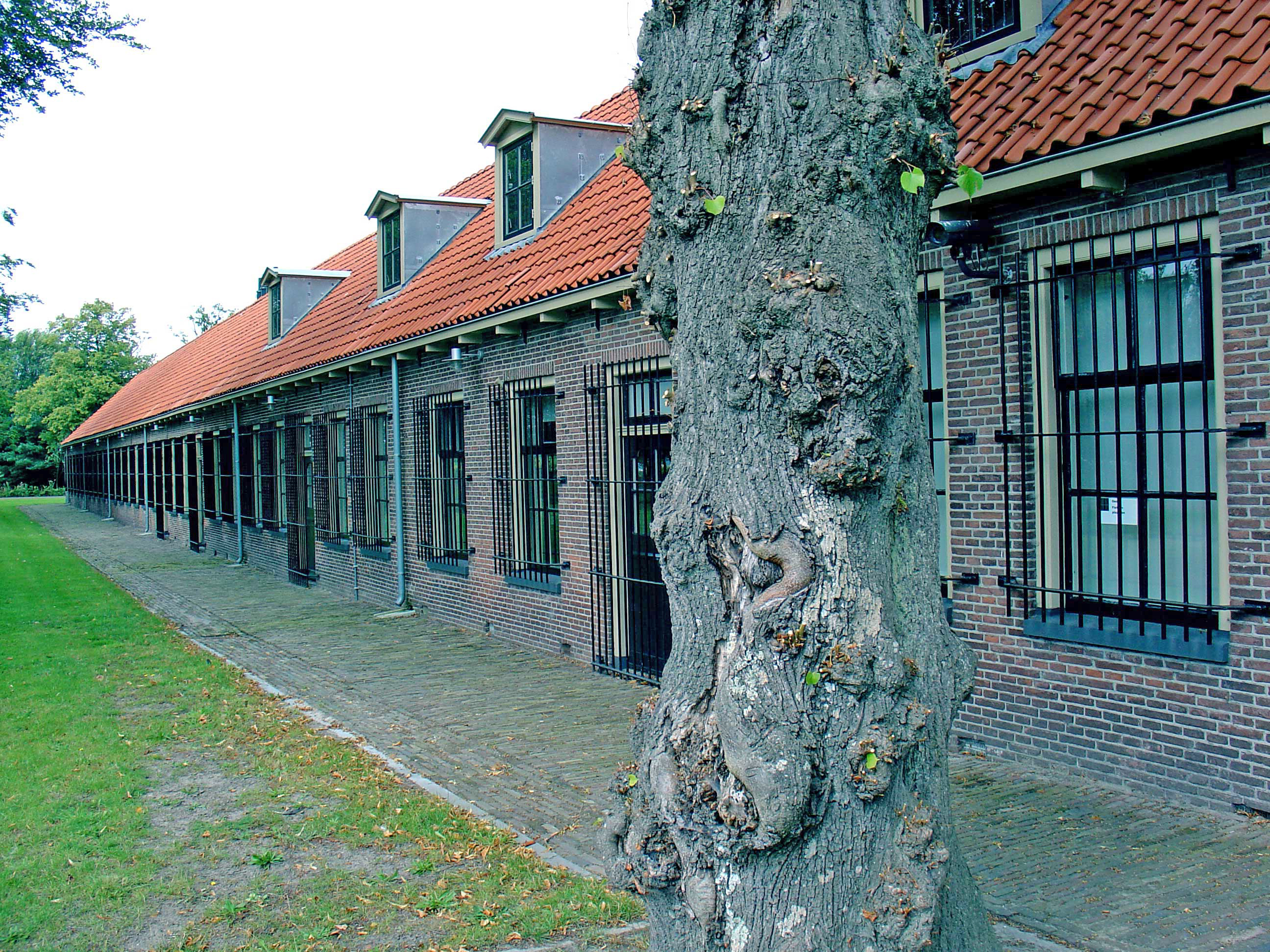 Tweede gesticht te Veenhuizen (Maatschappij van Weldadigheid)